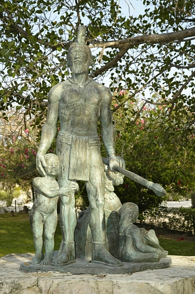 Estatua alusiva a Guerrero y al Mestizaje, hecha por Raúl Ayala Arellano en 1974. Otra copia existe en la Prolongación Paseo de Montejo en Mérida, Yucatán.